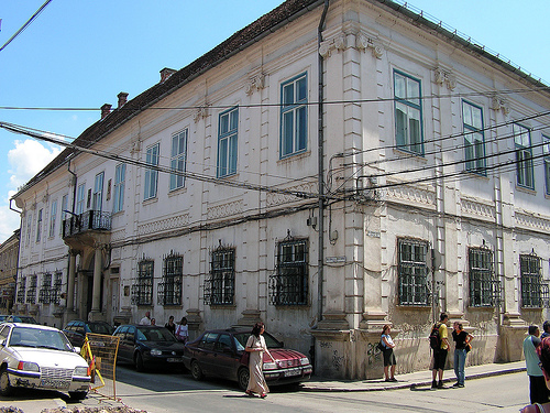 Cluj-Napoca, Palatul Toldalagi-Korda, str. I.C.Brătianu nr.14